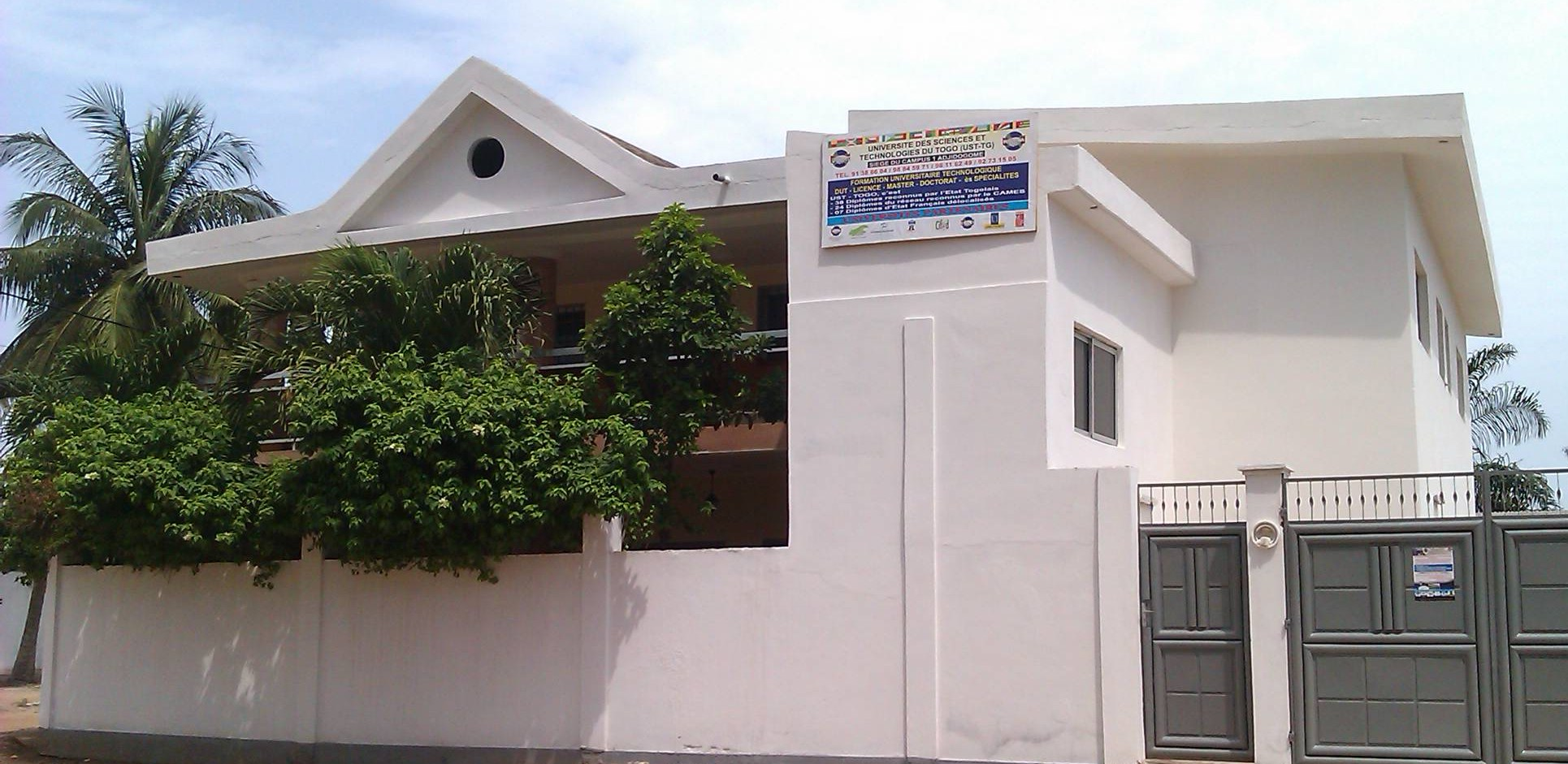 Locaux de l'Université des Sciences et Technologies du Togo (UST-TG) situés à Adidogomé à Lomé.